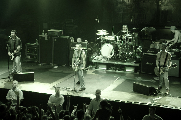 Social Distortion rocken Köln nach 9 Jahren Abstinenz